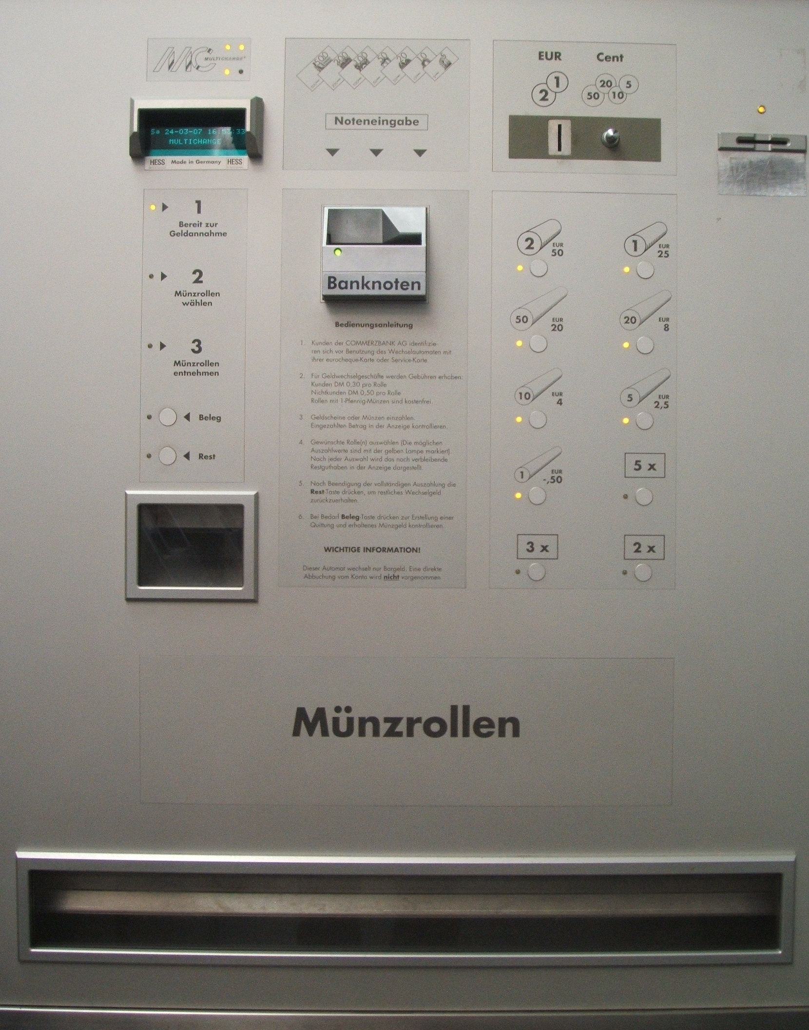 Automat für Münzrollenausgabe 2007 in Stuttgart, Commerzbank in der Königstraße